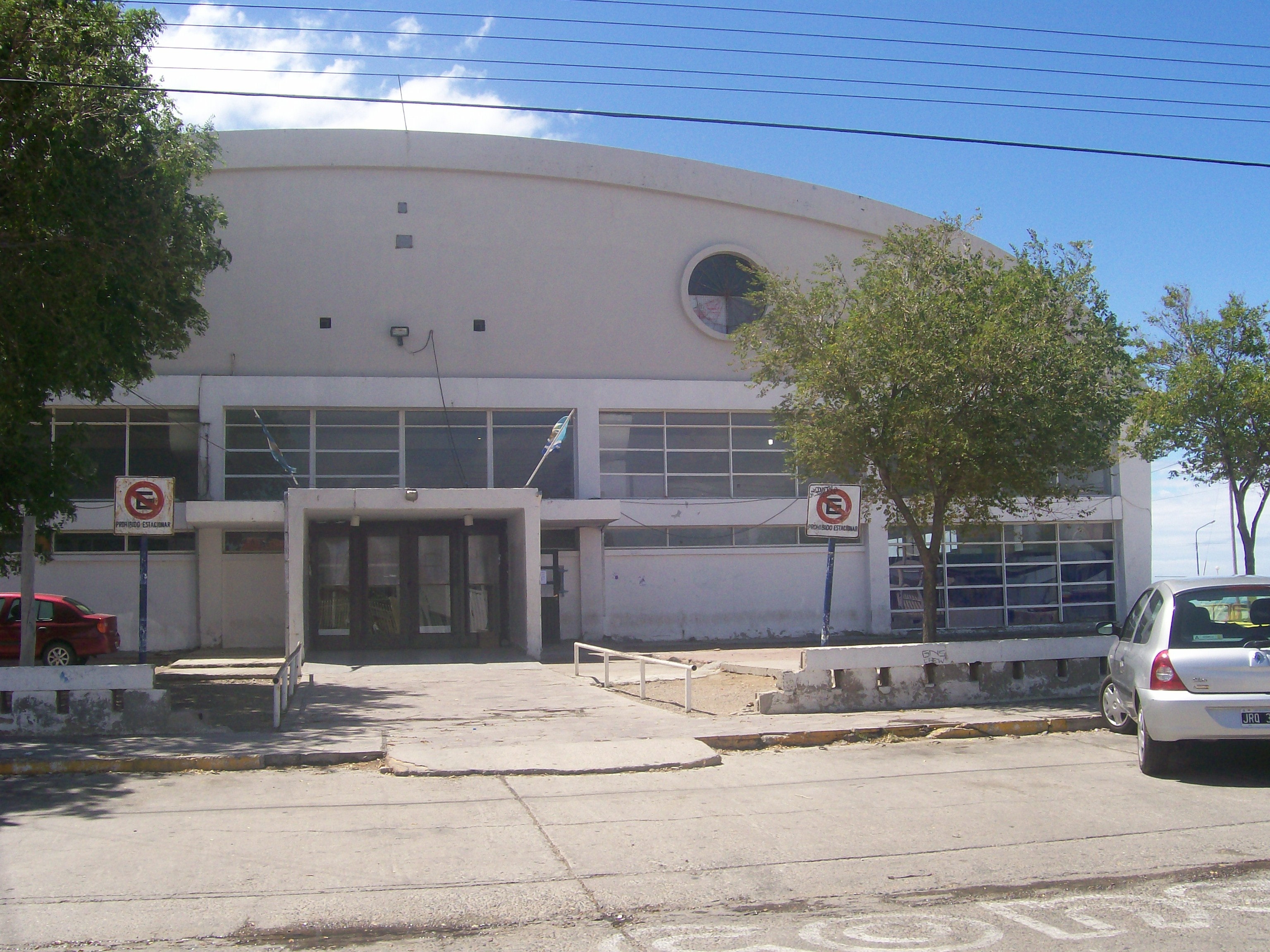 esta foto la saque en enero de 2012, muestra parcial del complejo Ing. knudsen